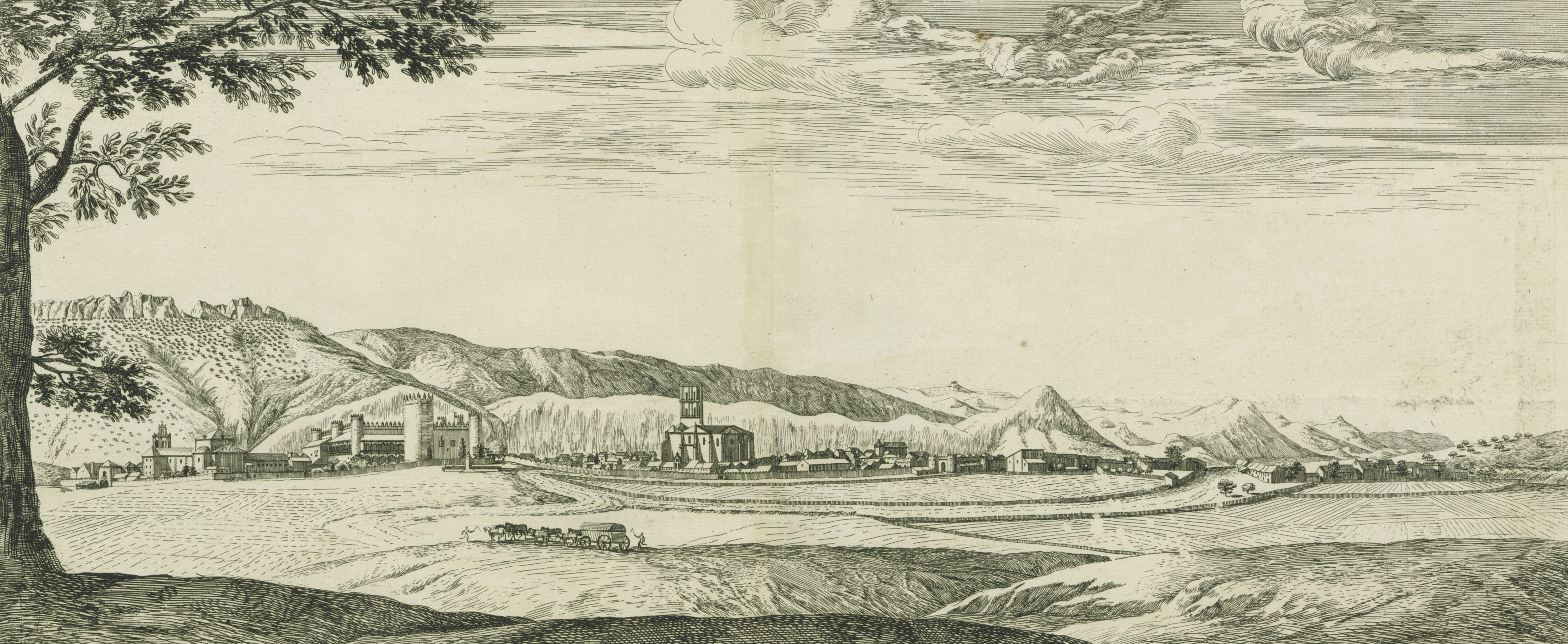 Profil de la ville de Zafra, en Espagne.